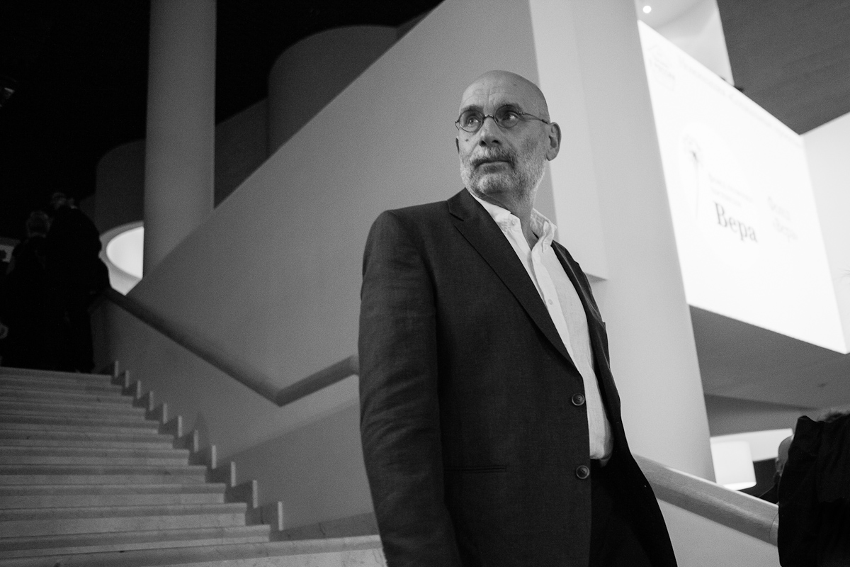 Борис Акунин / Boris Akunin